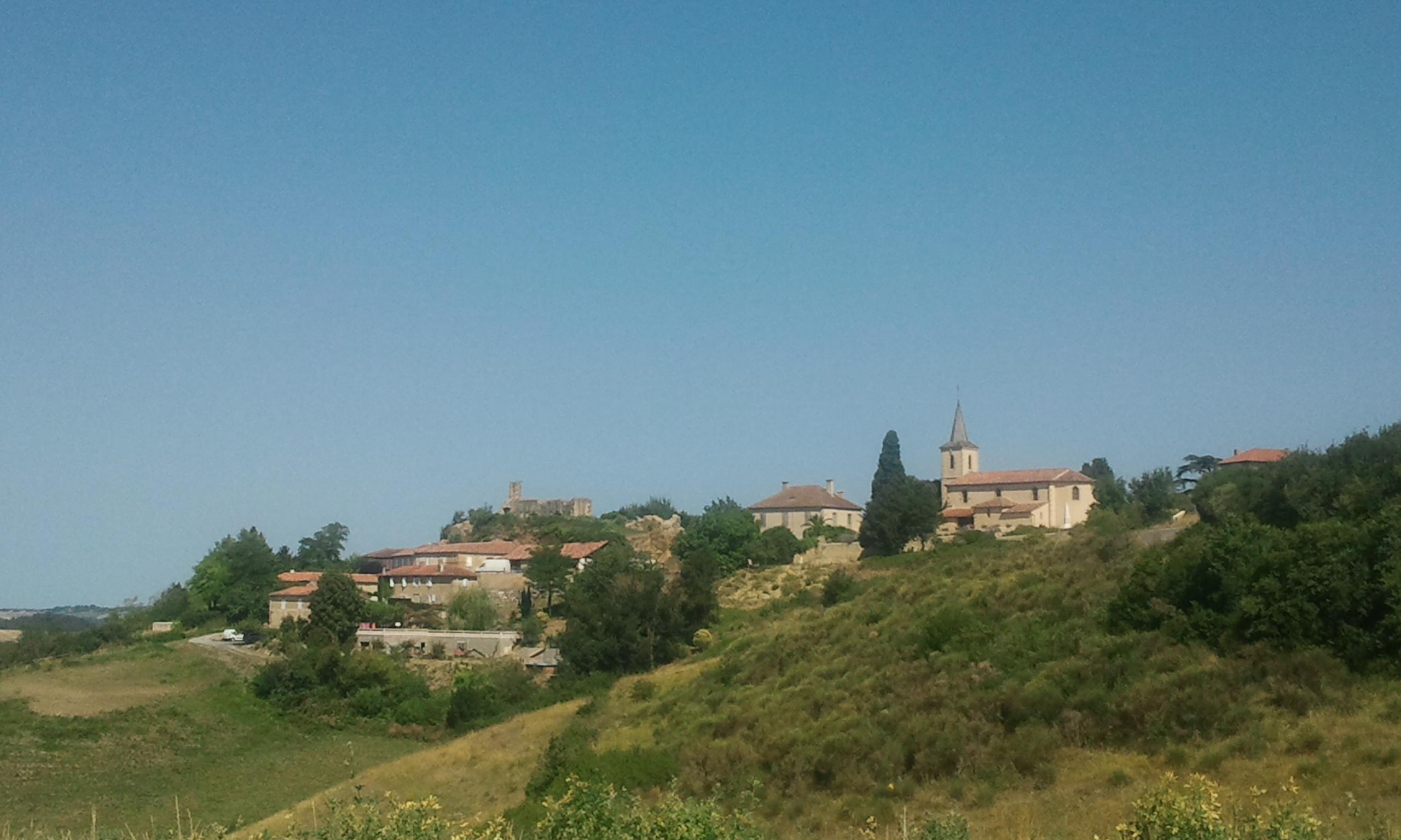 Vue générale de Durban (Gers)